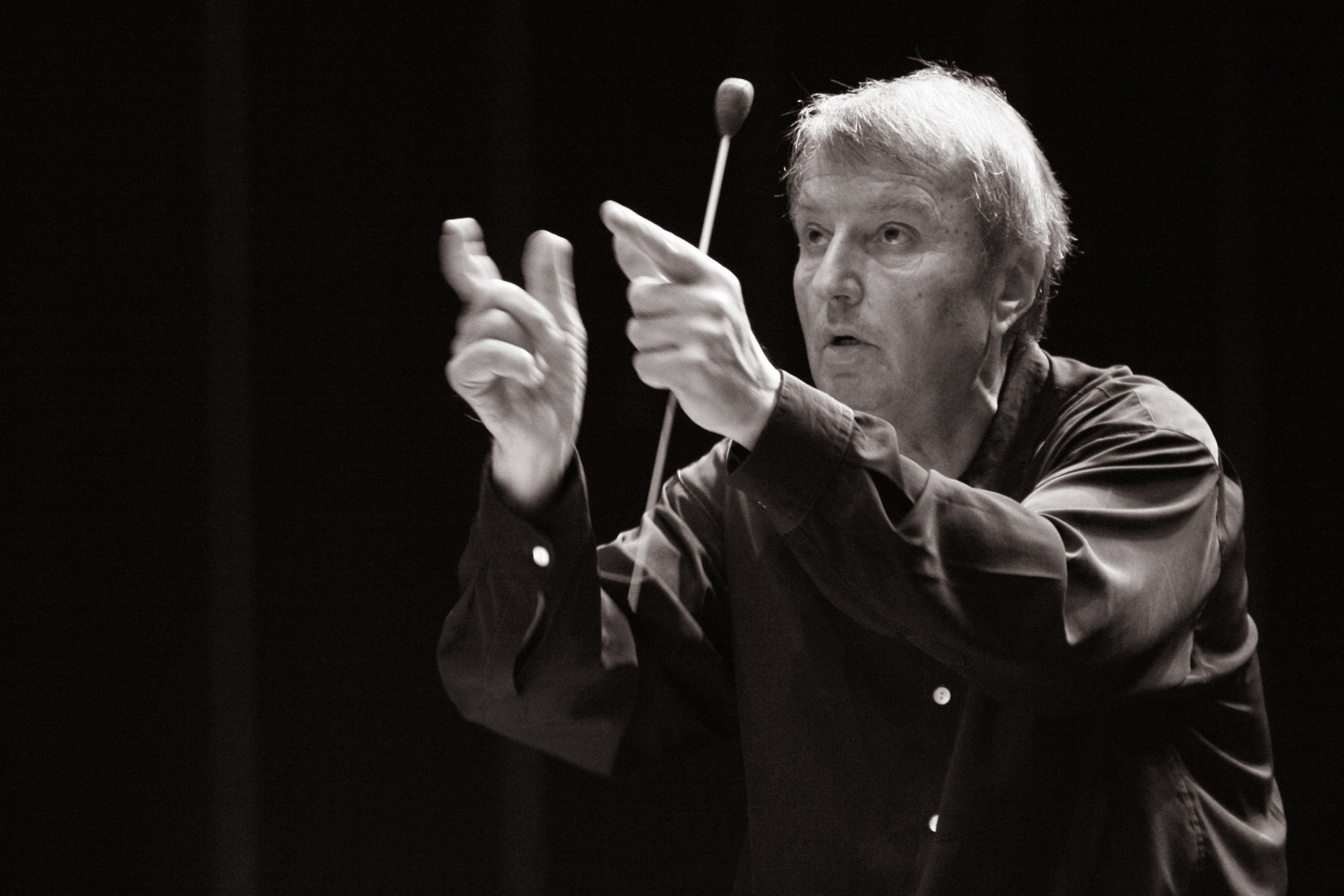 Philippe Bender en 2005